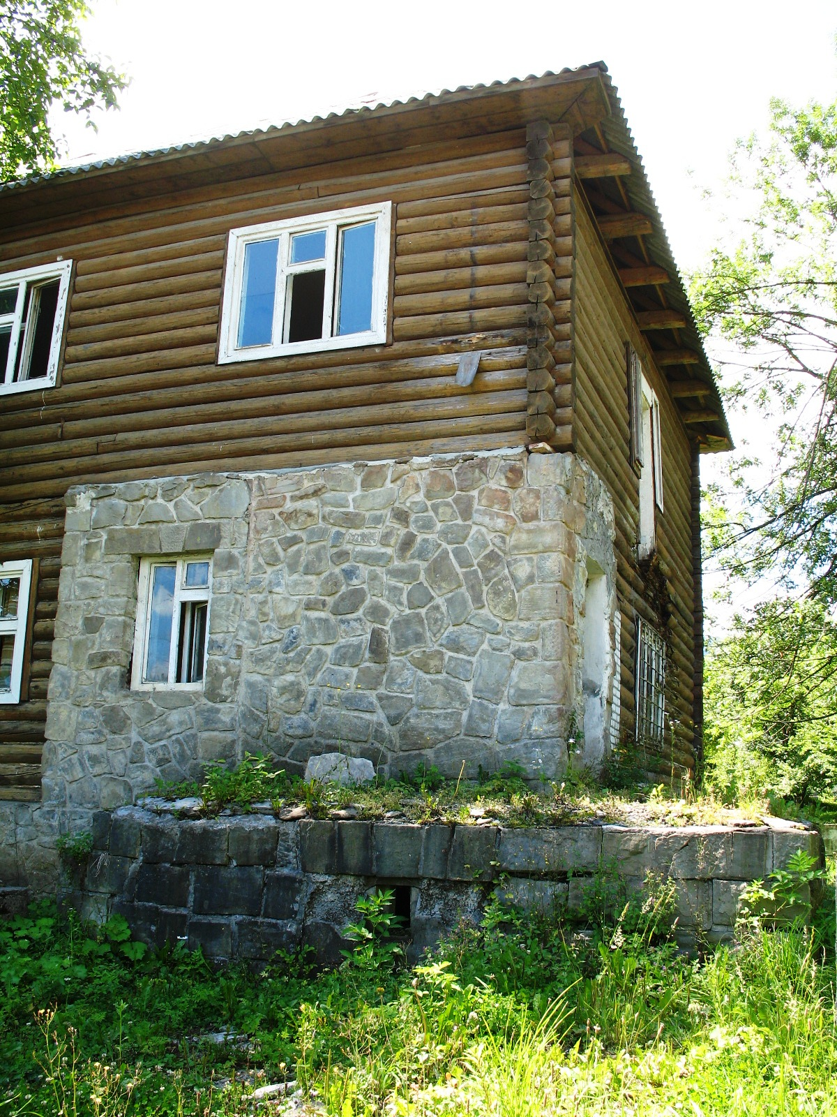 дзот